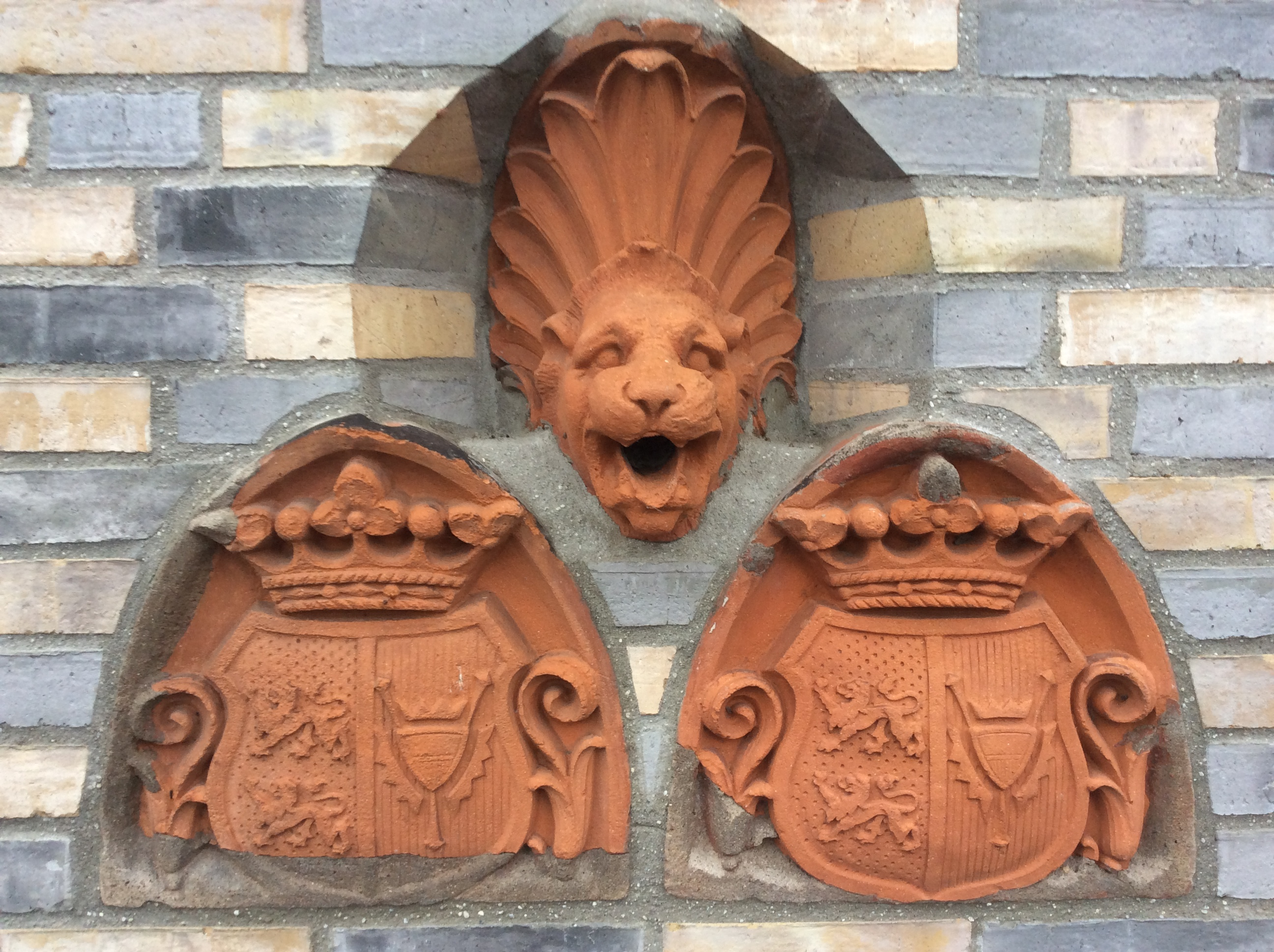 Das Foto zeigt die Reste (Spolien) des 1872 von dem Ostseesturmhochwasser zerstörten Baldachins des Süderschanzen-Denkmals in Eckernförde. 2011 wurden die Reste in die Fassade des Neubaus "Am Exer 4" eingebaut.